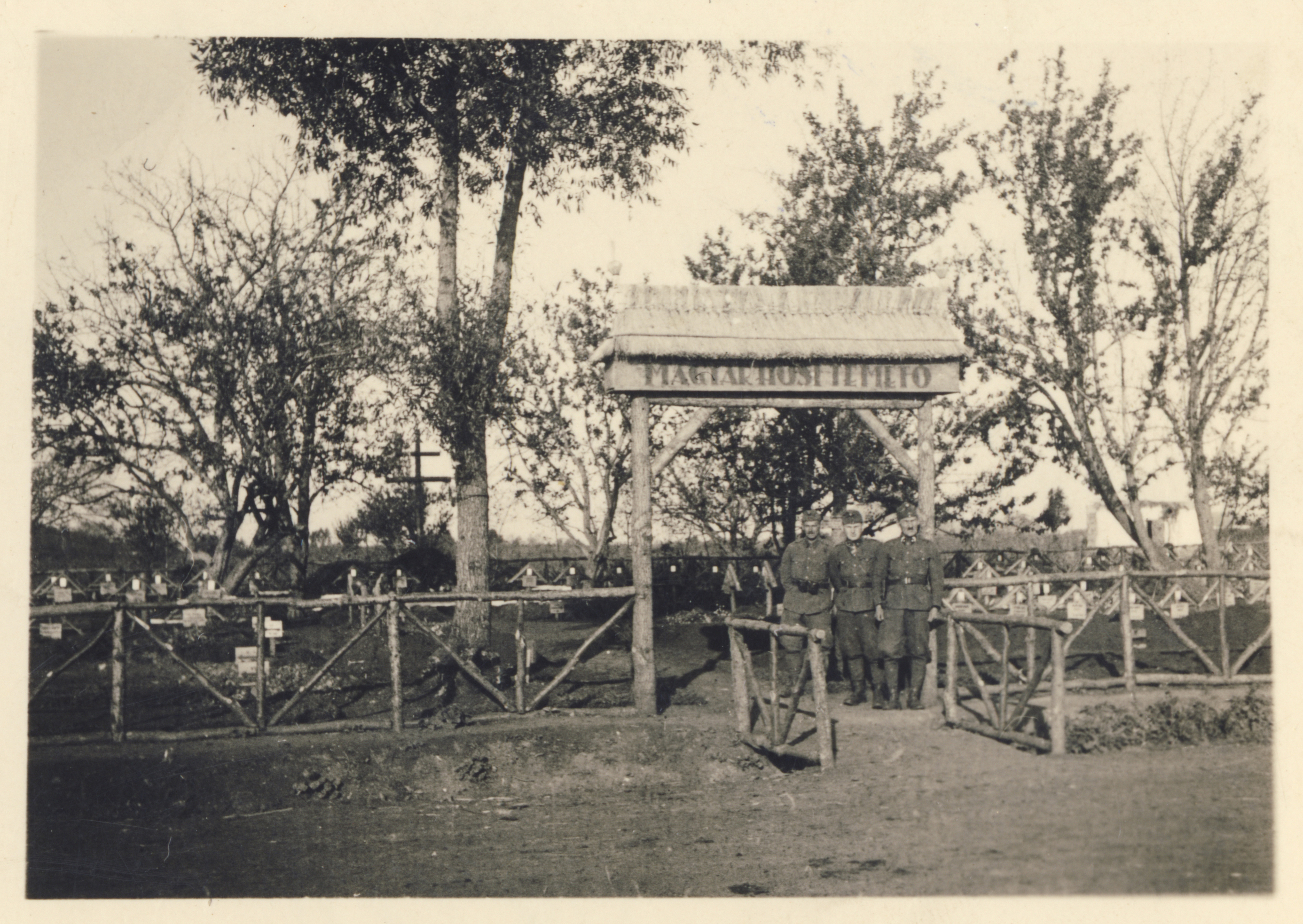 Jablocsnoje hősi temető 1942-ben, a fénykép Bucz Sándor hagyatékából származik